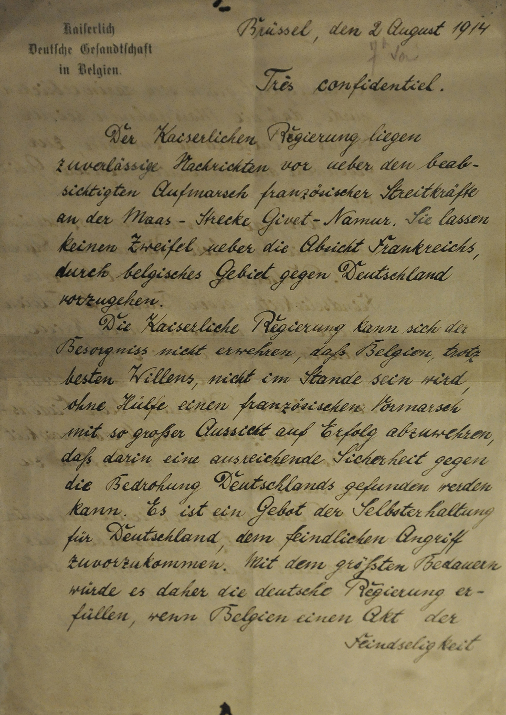 Duits ultimatum aan België 2-8-1914 Koninklijk Museum van het Leger en de Krijgsgeschiedenis Brussel This photo of movable heritage has been taken in the Brussels Capital Region